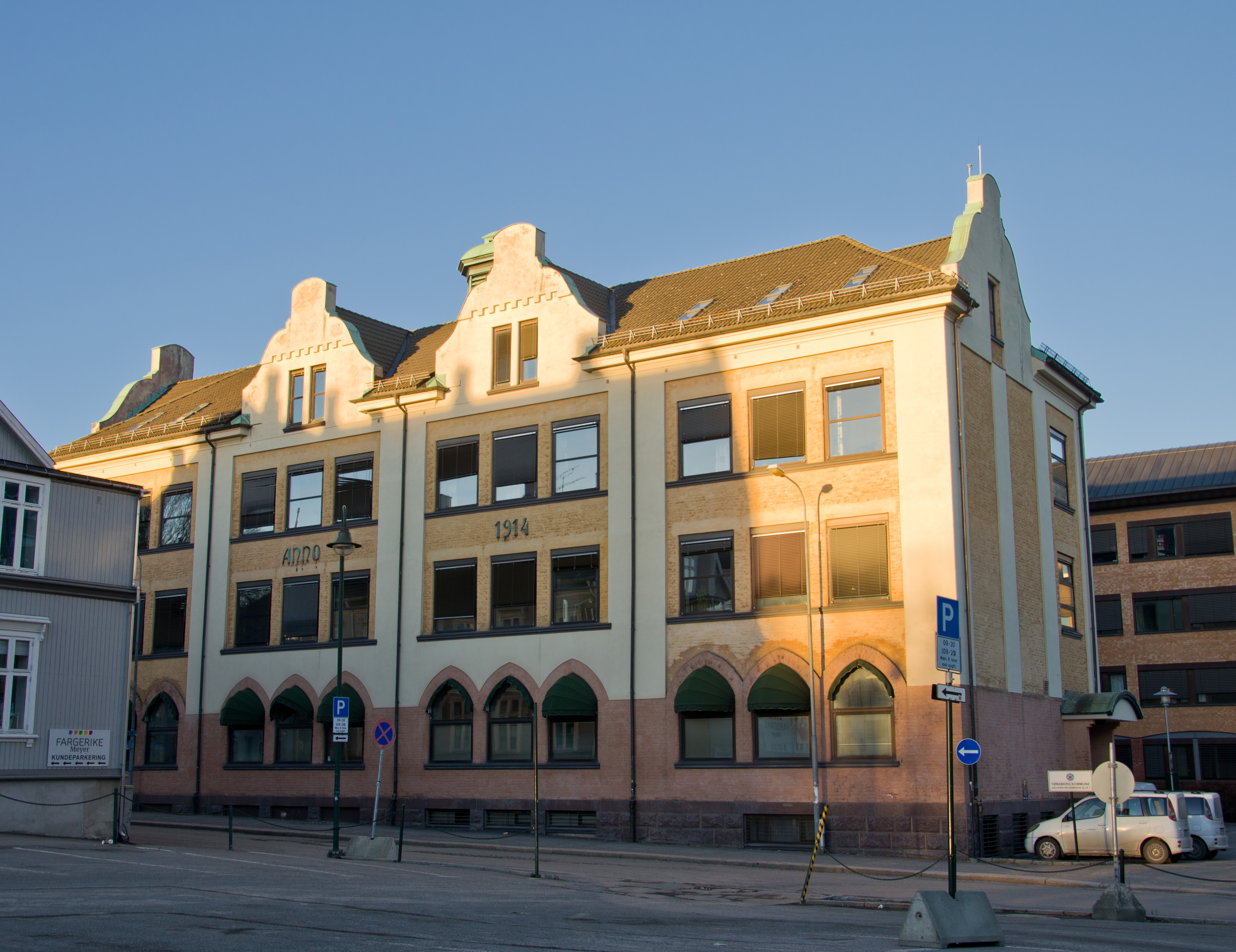 Halfdan Wilhelmsens allé 1 Byfogdløkka i Tønsberg